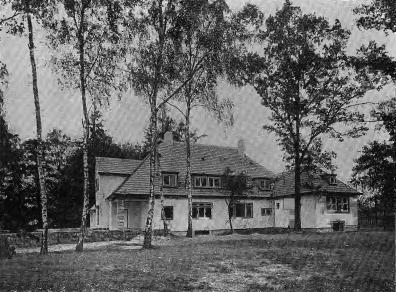 Landhaus des Grafen Strachwitz in Kadlub. Architekt: Heinrich Lauterbach aus Breslau. Fotografiert von Max Glauer.